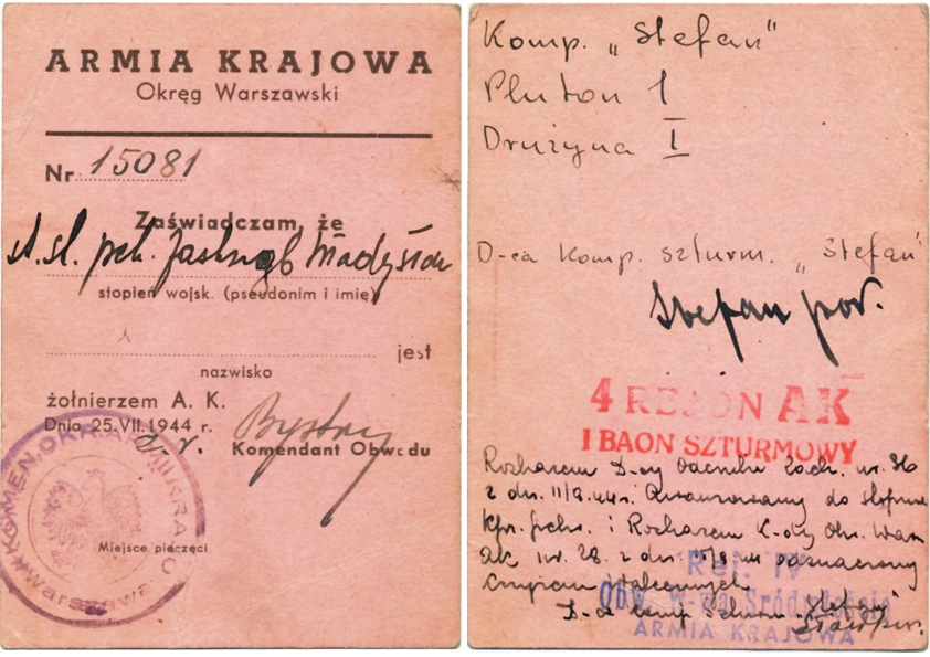 Legitymacja Żołnierza Armii Krajowej - awers. Rewers - Odznaczenie Krzyżem Walecznych VIII.1944